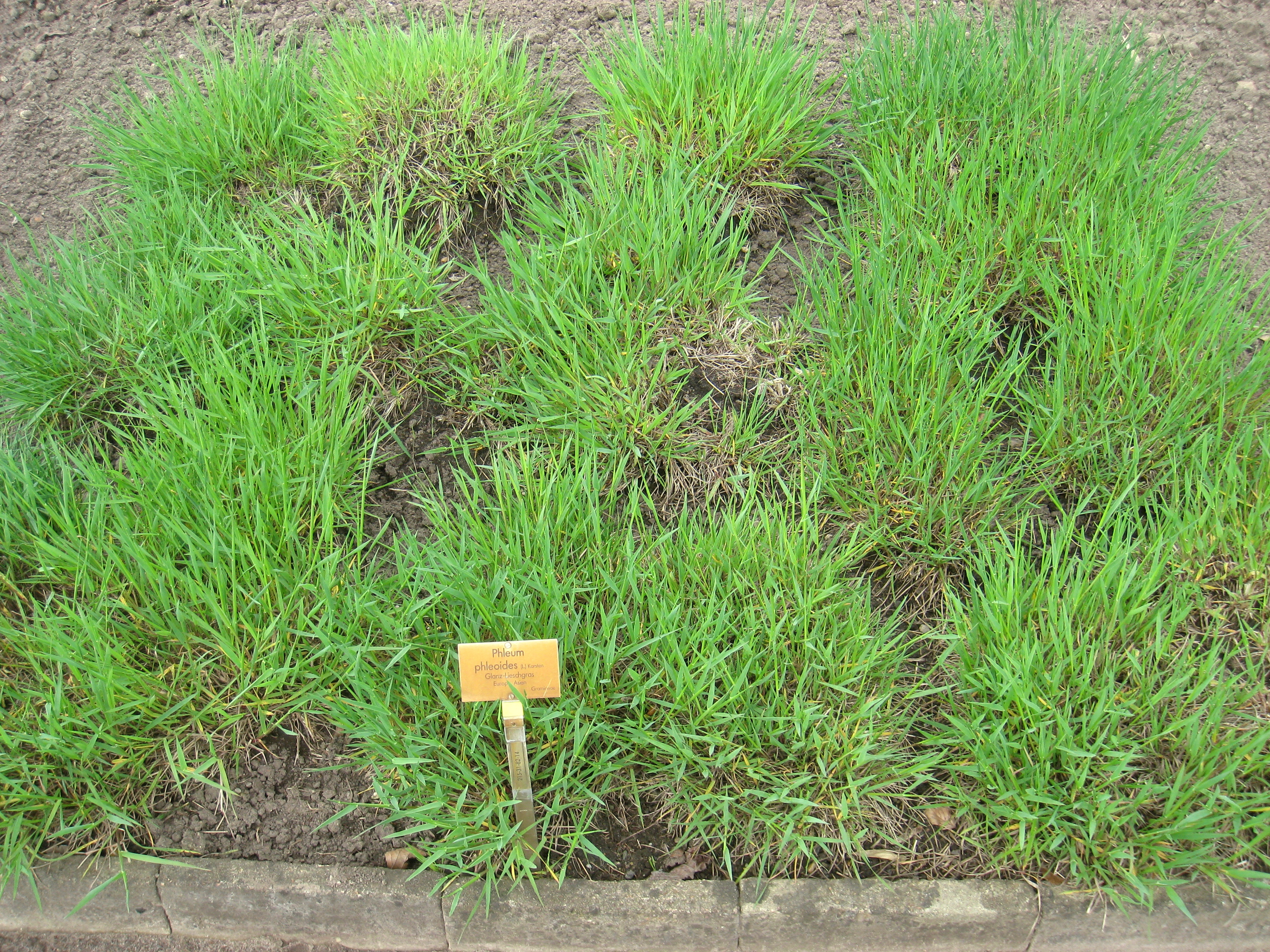 Phleum phleoides specimen in the Botanischer Garten, Berlin-Dahlem (Berlin Botanical Garden), Berlin, Germany.